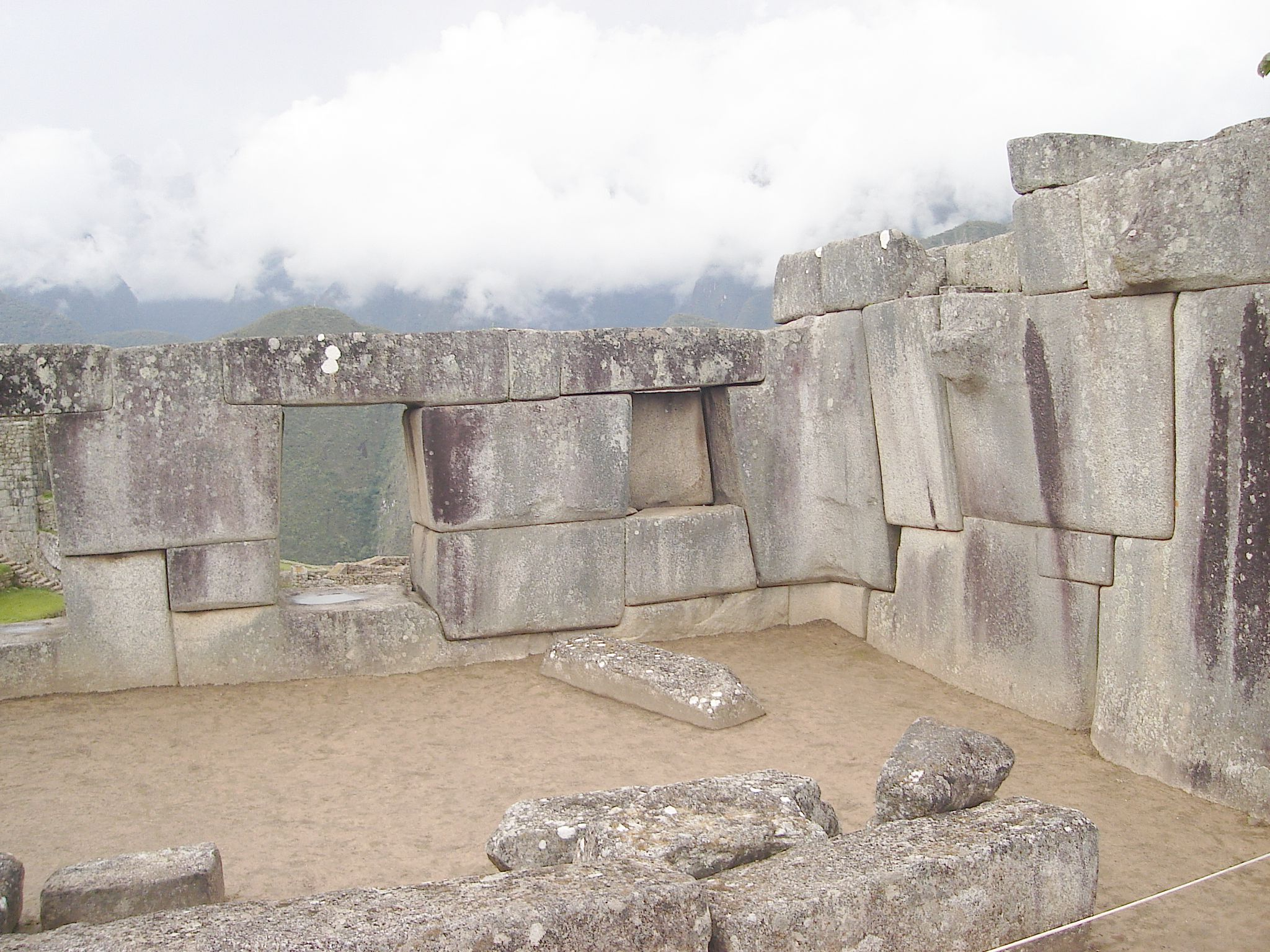 Foto tirada por mim, em Machu Picchu.